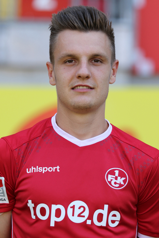 Gino Fechner